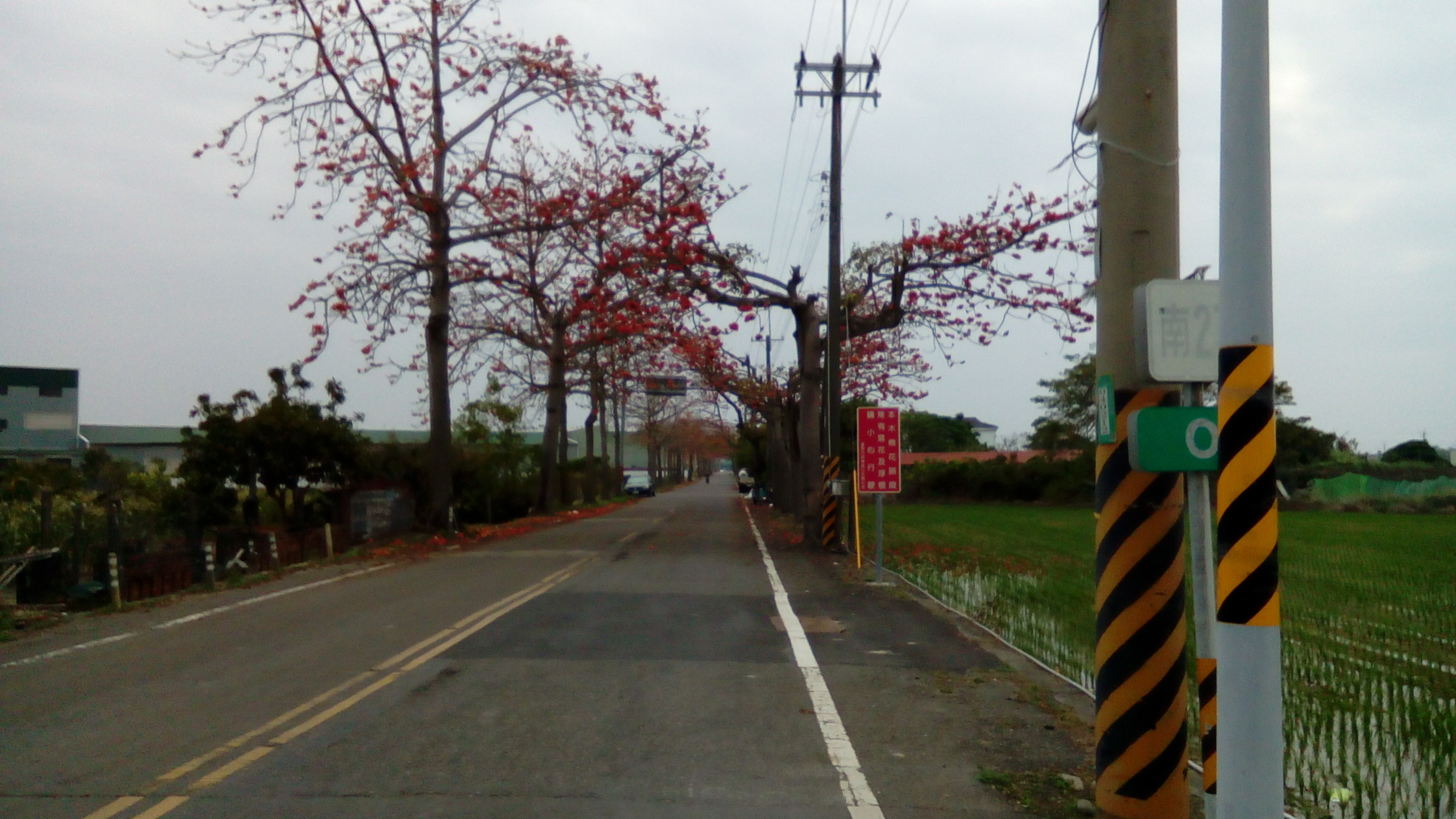 南27(往下營)與南19(往漚汪)路口